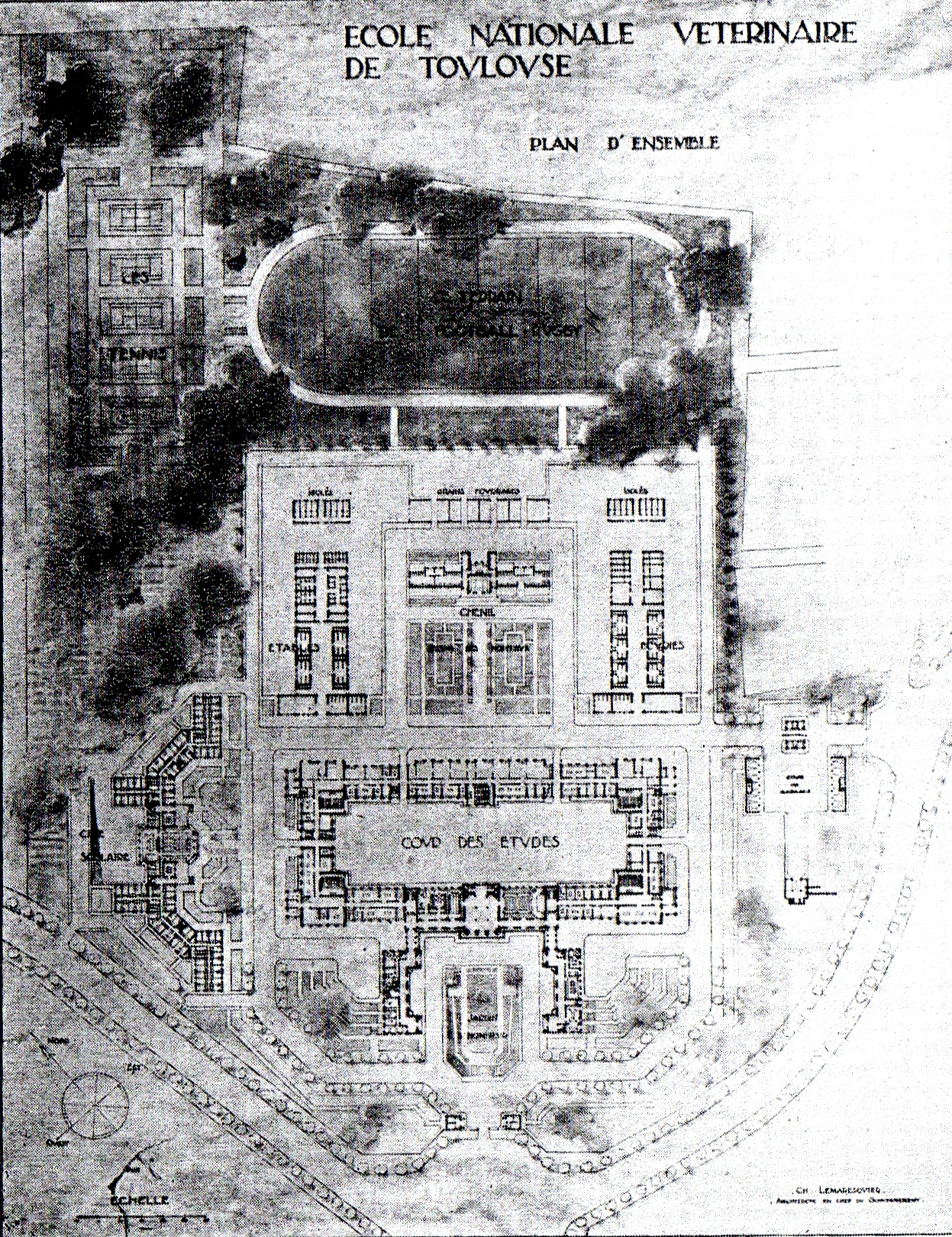 Plan d'ensemble de l'école vétérinaire de la Juncasse prévue par Charles Lemaresquier